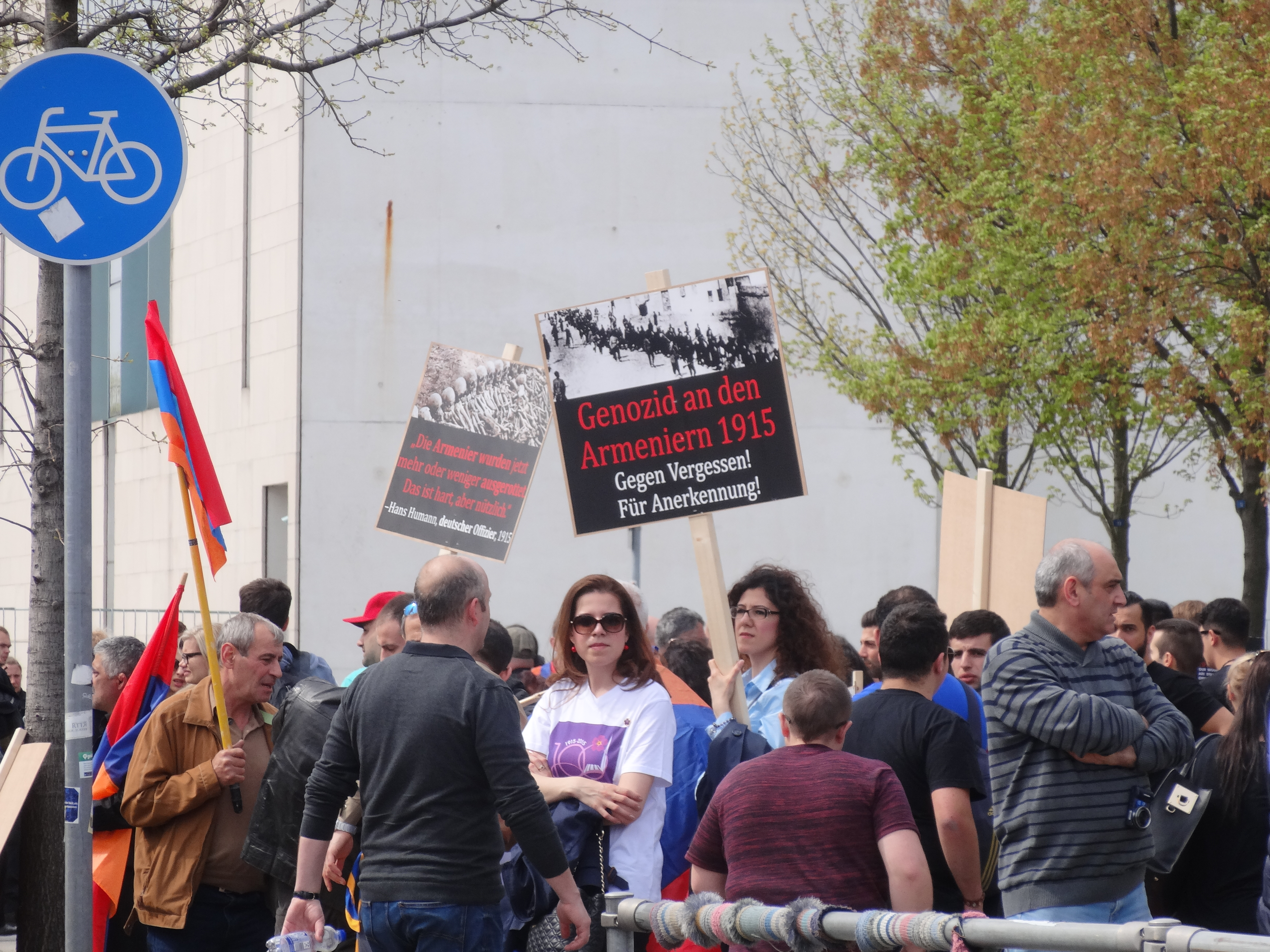 Demonstration "Genozid 1915 - Initiative Deutschland" in Berlin am 25.04.2015